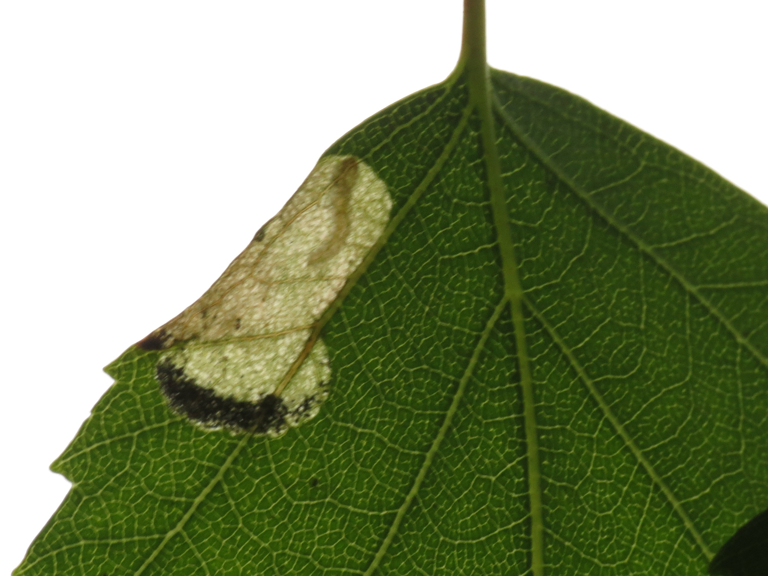 Eriocrania semipurpurella (Stephens, 1835), larva in mine on Betula, Hellerup, Denmark, 2 June 2013